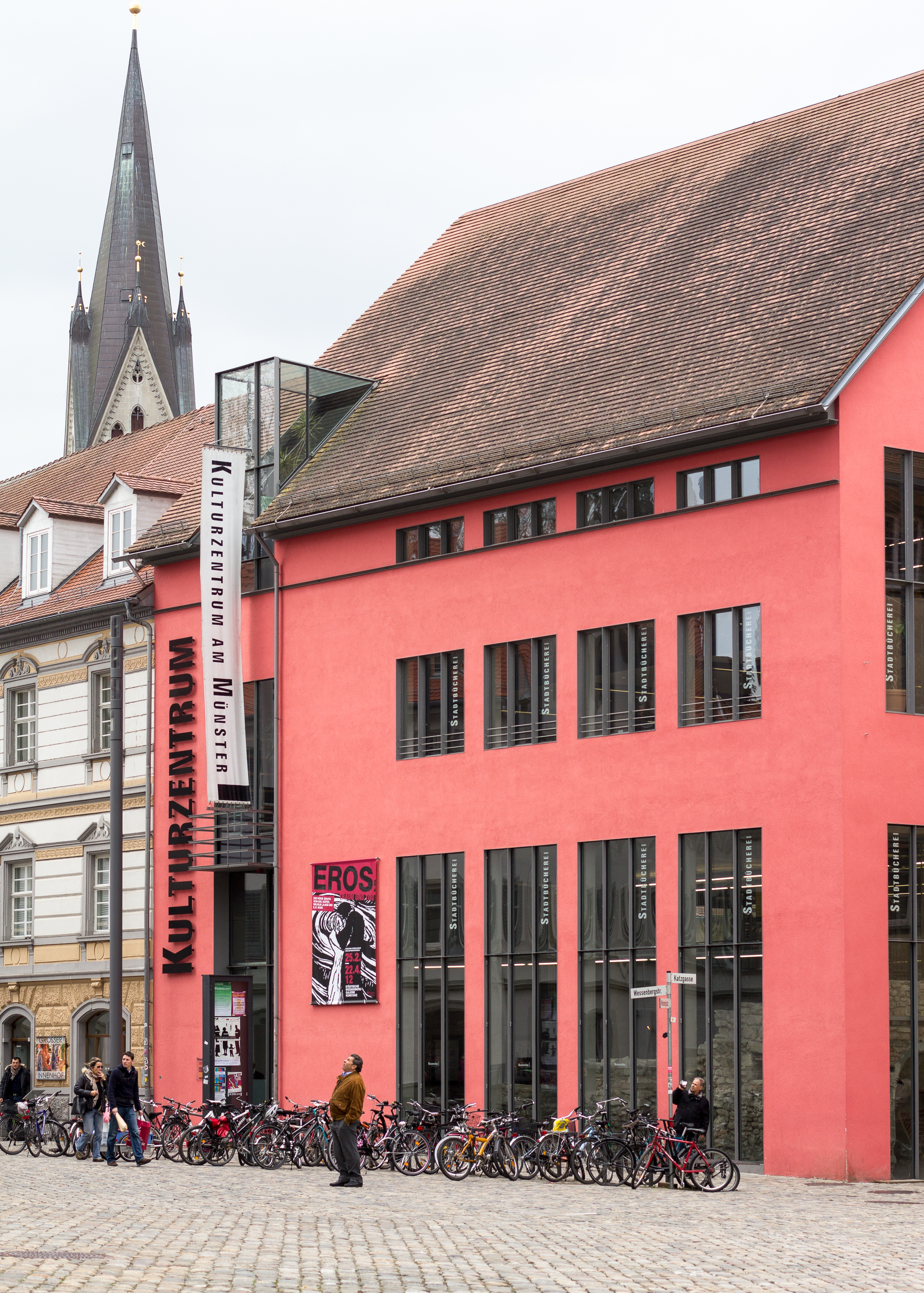 Kulturzentrum am Münster mit der Stadtbücherei und der Wessenberg-Galerie